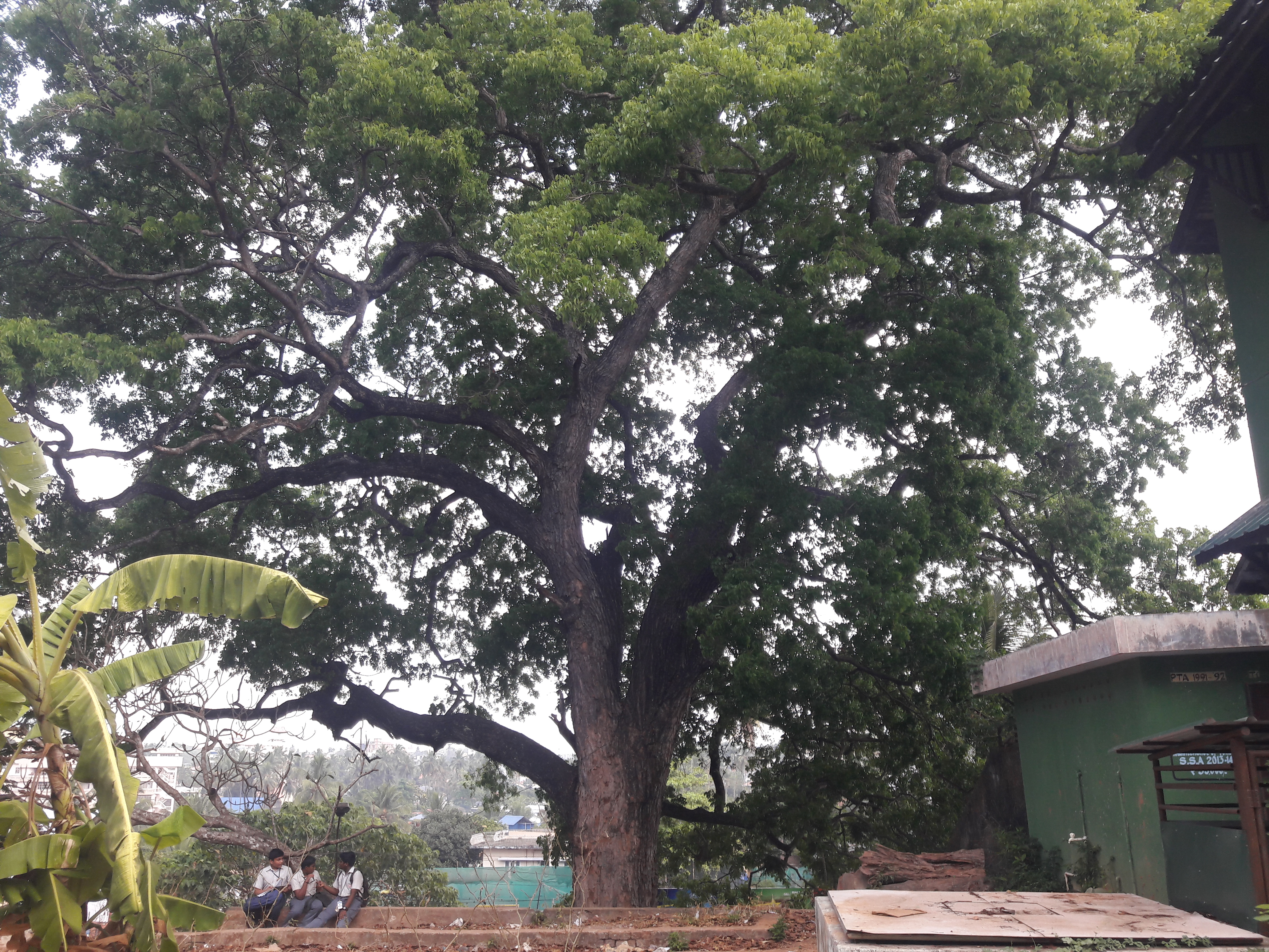 ഗവ. മോഡൽ ബോയ്സ് എച്ച്.എസ്.എസ്, തൈക്കാട് - ലെ 250 വര്‍ഷം പ്രായമായ ഒരു മഹാഗണി വൃക്ഷം.Mahagany tree ശാസ്ത്രീയ നാമം Swietenia mahagoni കുടുംബം Meliaceae.